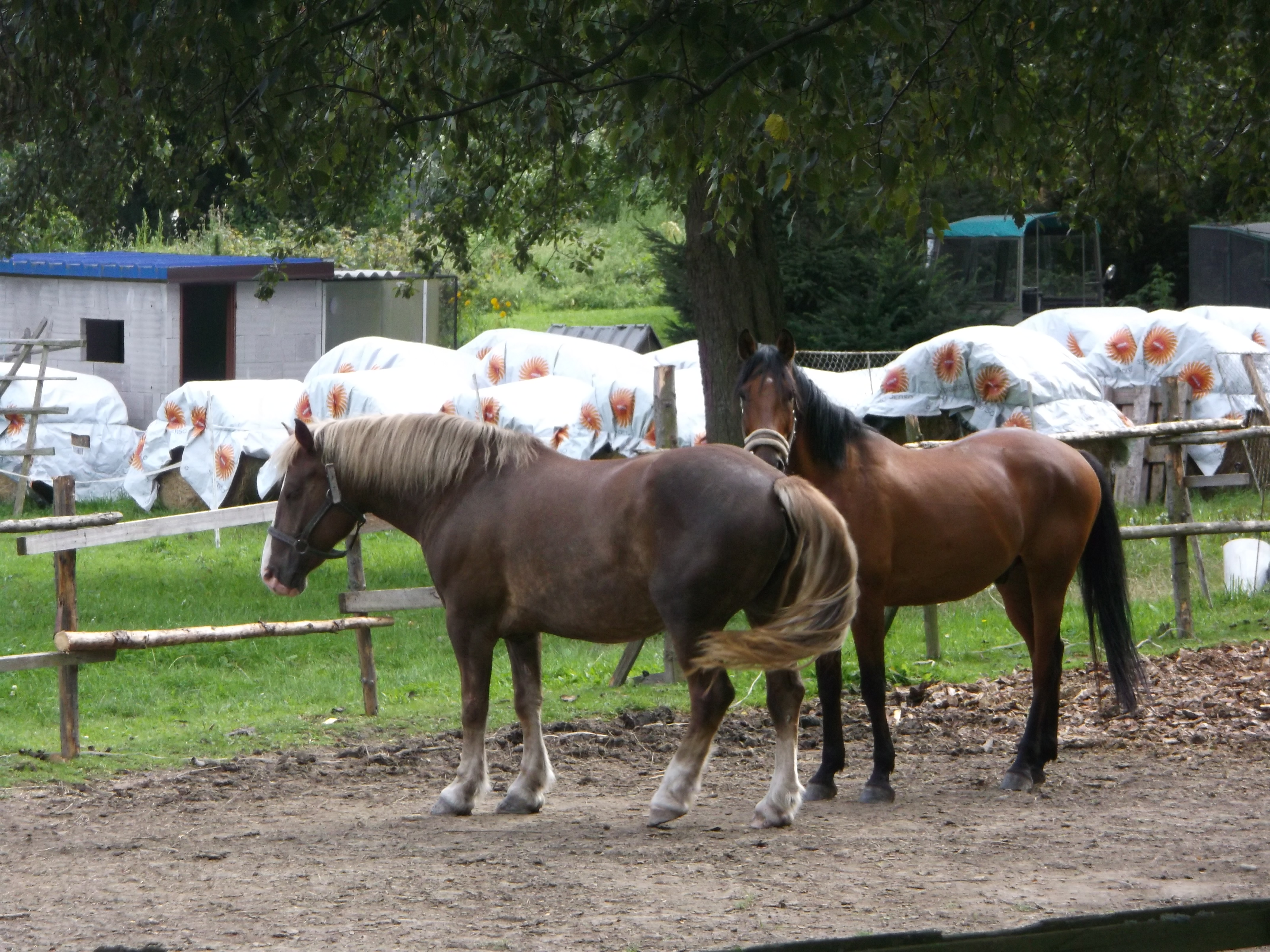 Čertovina - koně